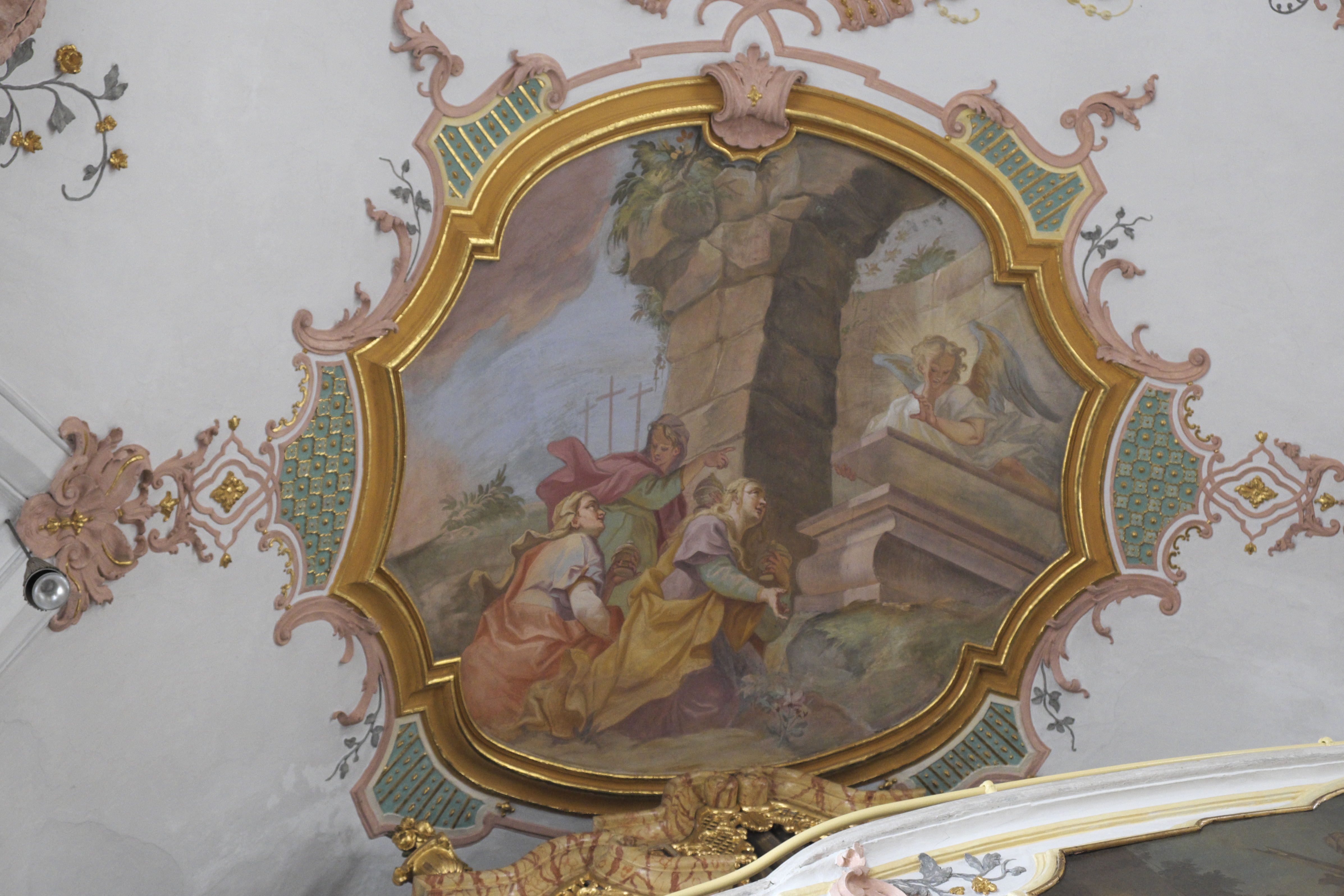 Katholische Pfarrkirche Mariä Himmelfahrt in Walleshausen, einem Ortsteil von Geltendorf im Landkreis Landsberg am Lech (Oberbayern/Bayern), Deckenfresko im Langhaus über der Orgelempore von Johann Georg Wolcker; Darstellung: Frauen am Grab